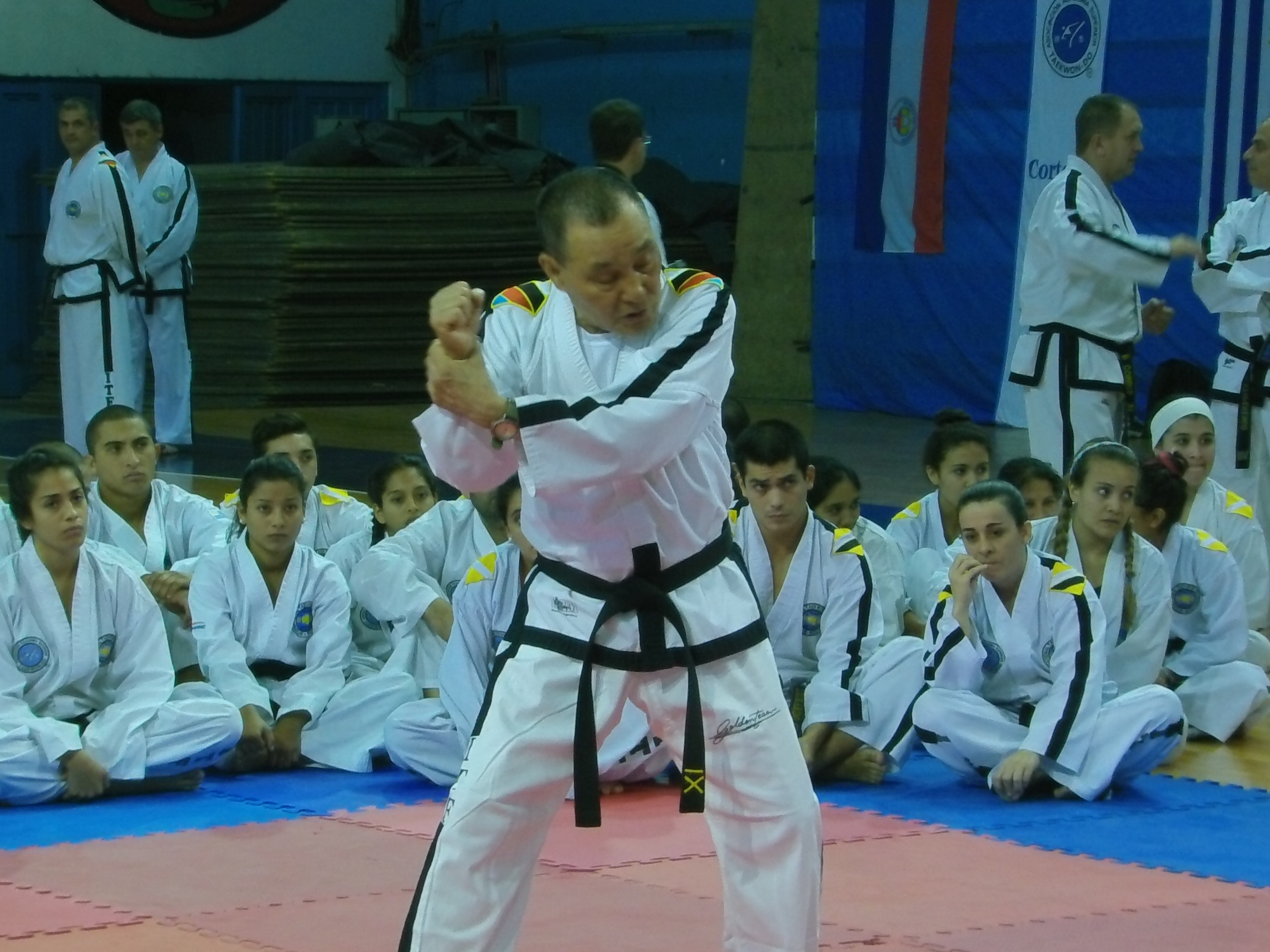 El Gran Maestro K-9-1 Hwang Kwang Sung, durante un seminario dictado en Corrientes, Argentina